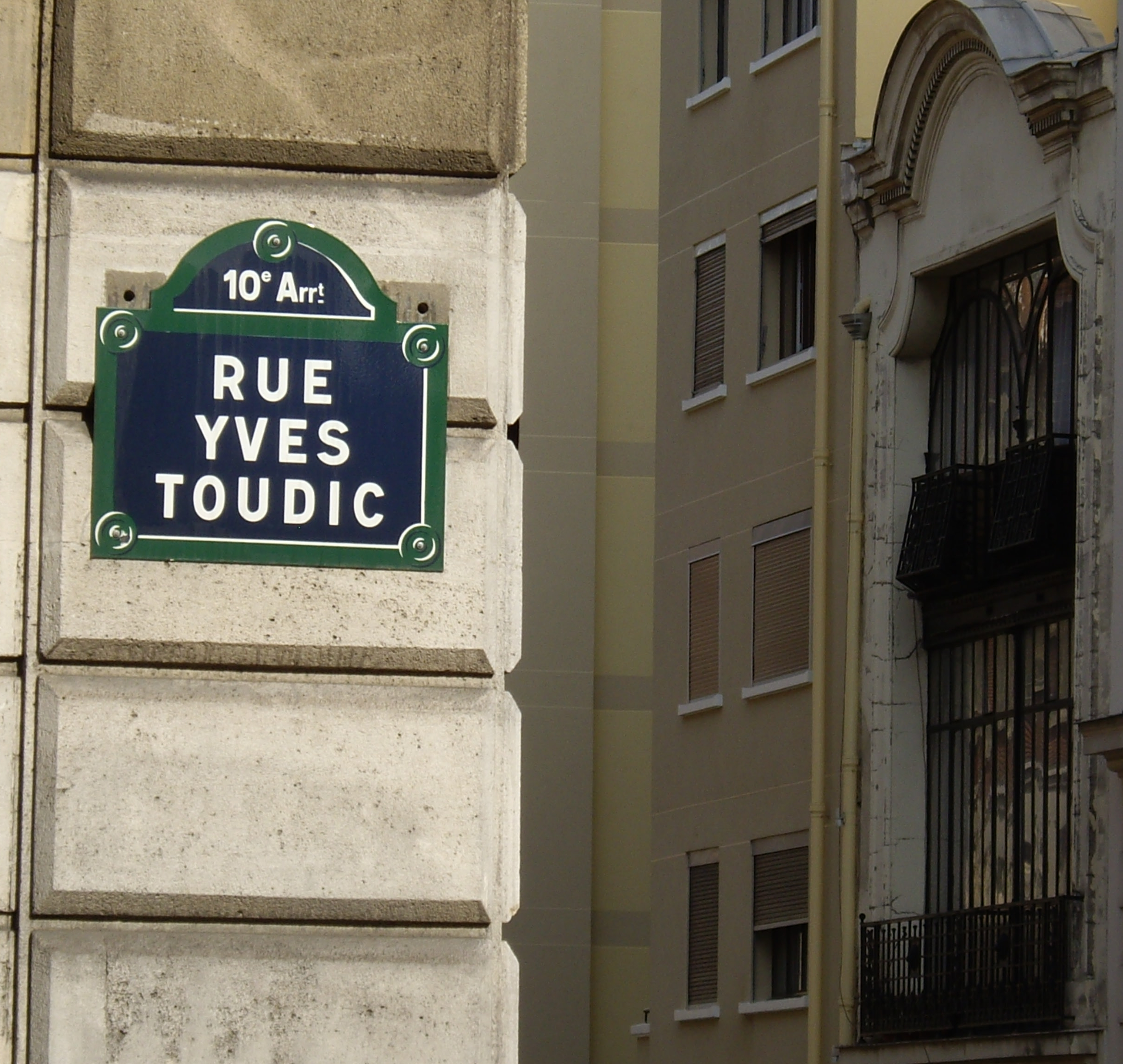 Rue Yves-Toudic, Paris 10e, nommée en mémoire du syndicaliste Yves Toudic (1901-1944), tué le 14 juillet 1944 lors d'une manifestation patriotique sur la place de la République.